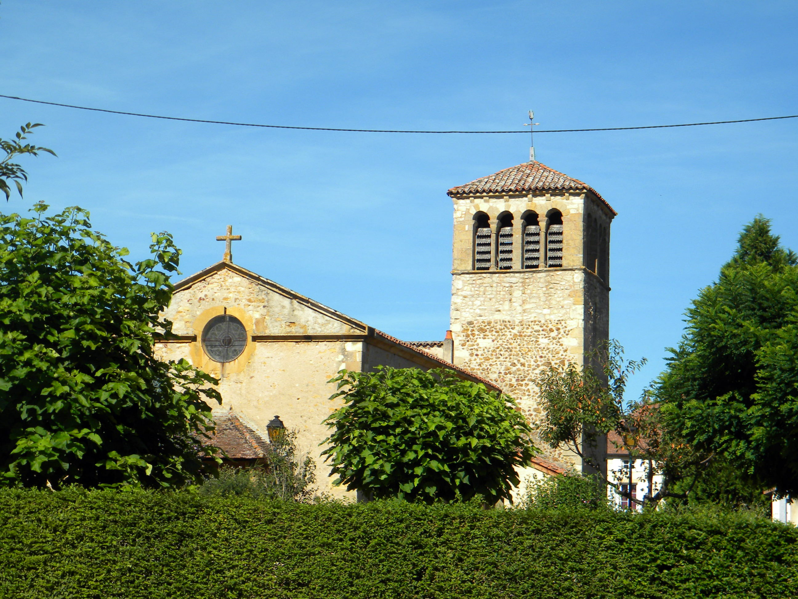 L'église partiellement romane de Saint-Martin-du-Lac